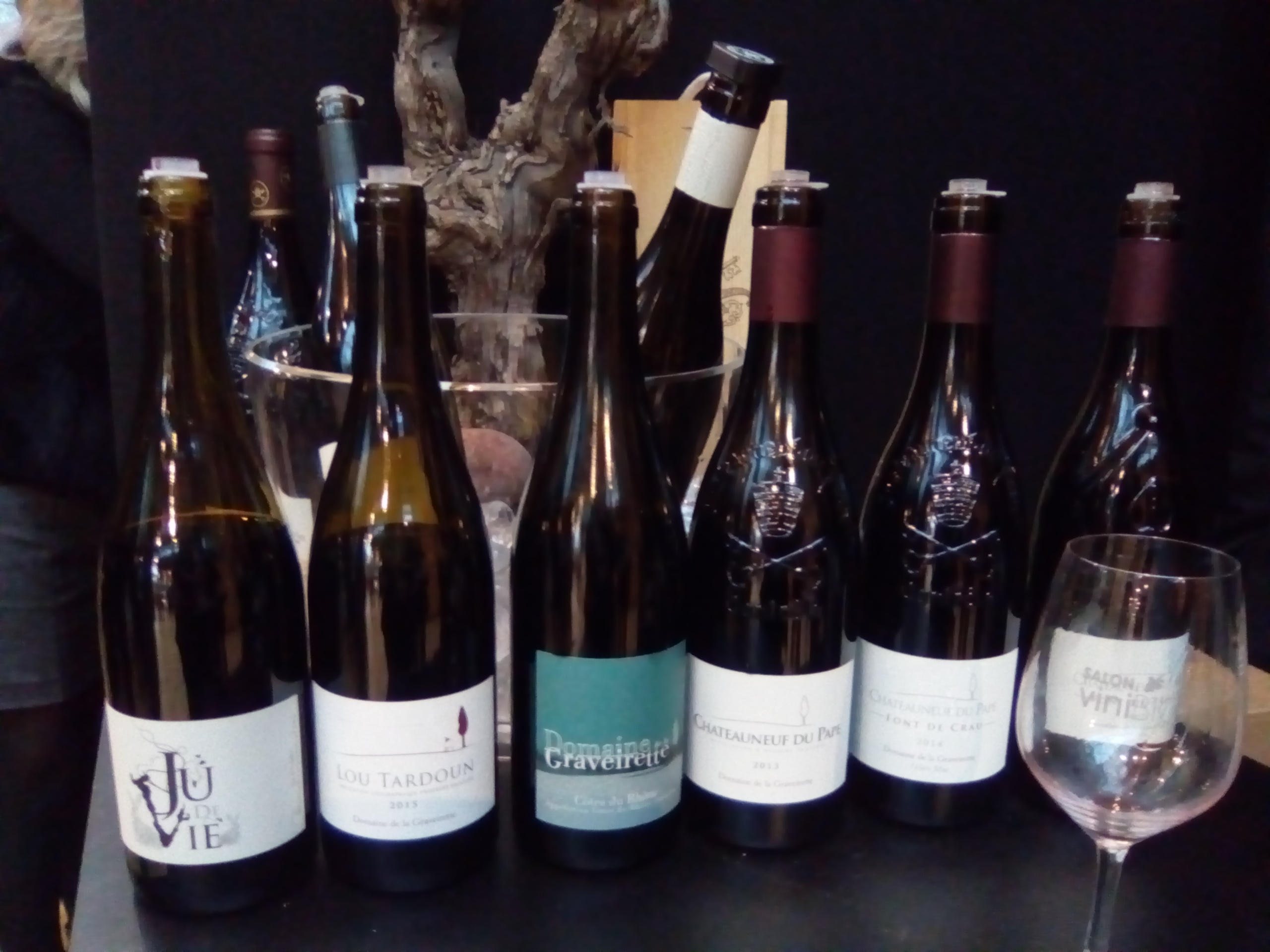 Salon vinibio.